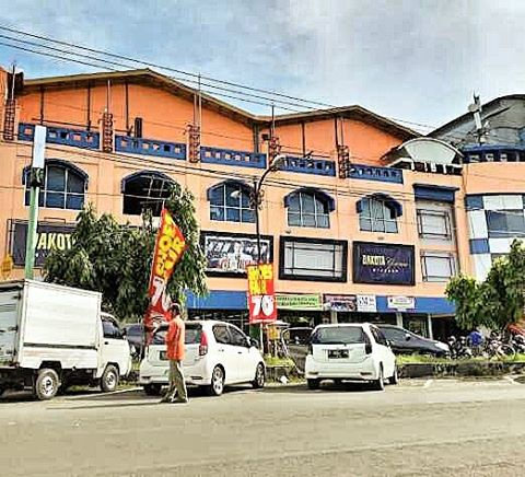 Plaza Cilacap merupakan salah satu pusat perbelanjaan terlengkap di Kota Cilacap